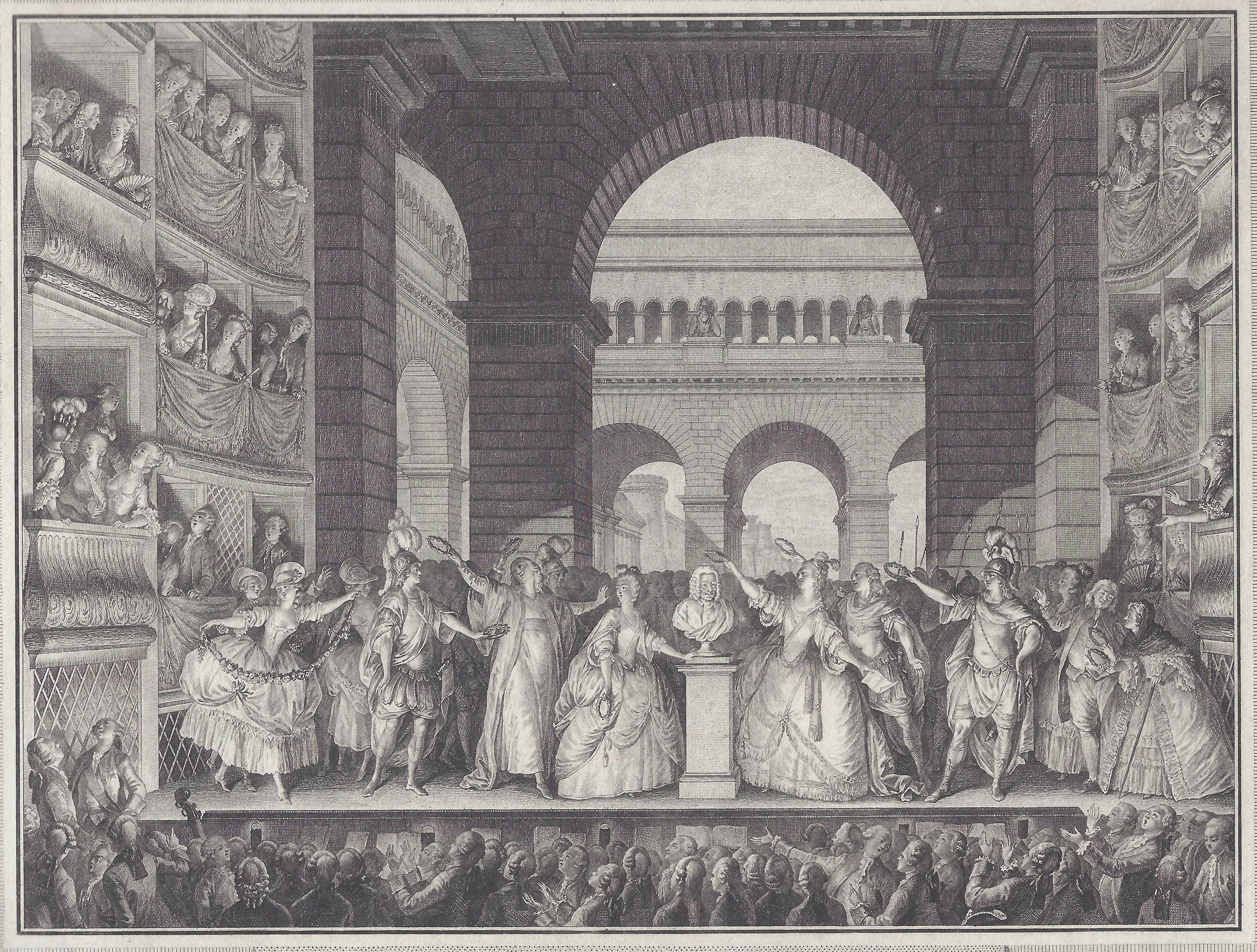 Couronnement de Voltaire. Krönung der Büste Voltaires in der Comédie Francaise 1778 nach der sechsten Aufführung der Irène am 30.März 1778. Der anwesende Voltaire sitzt in der oberen Loge links. Kupferstich ohne Umrahmung und Bildlegende.